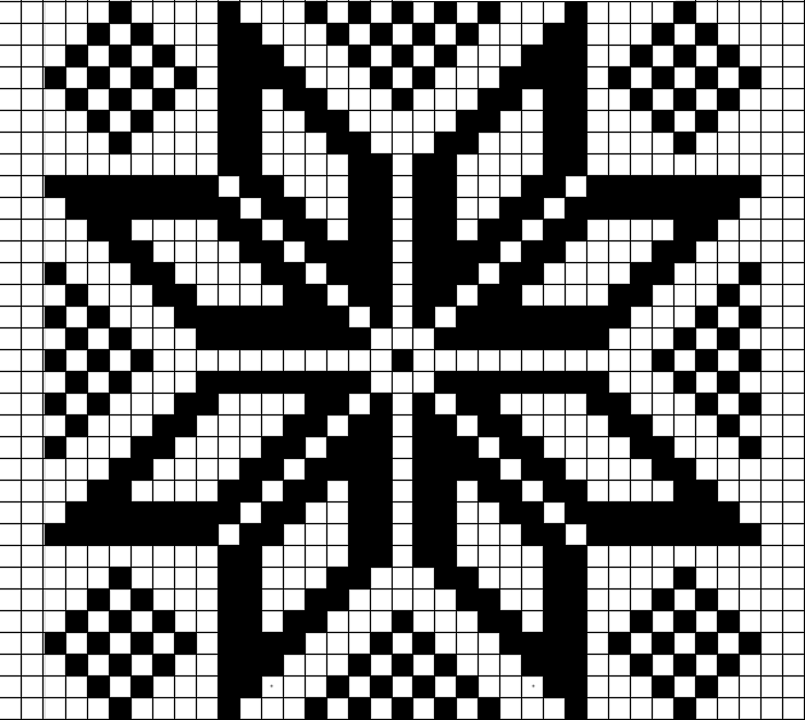 Motif norvégien Aattskjaennros